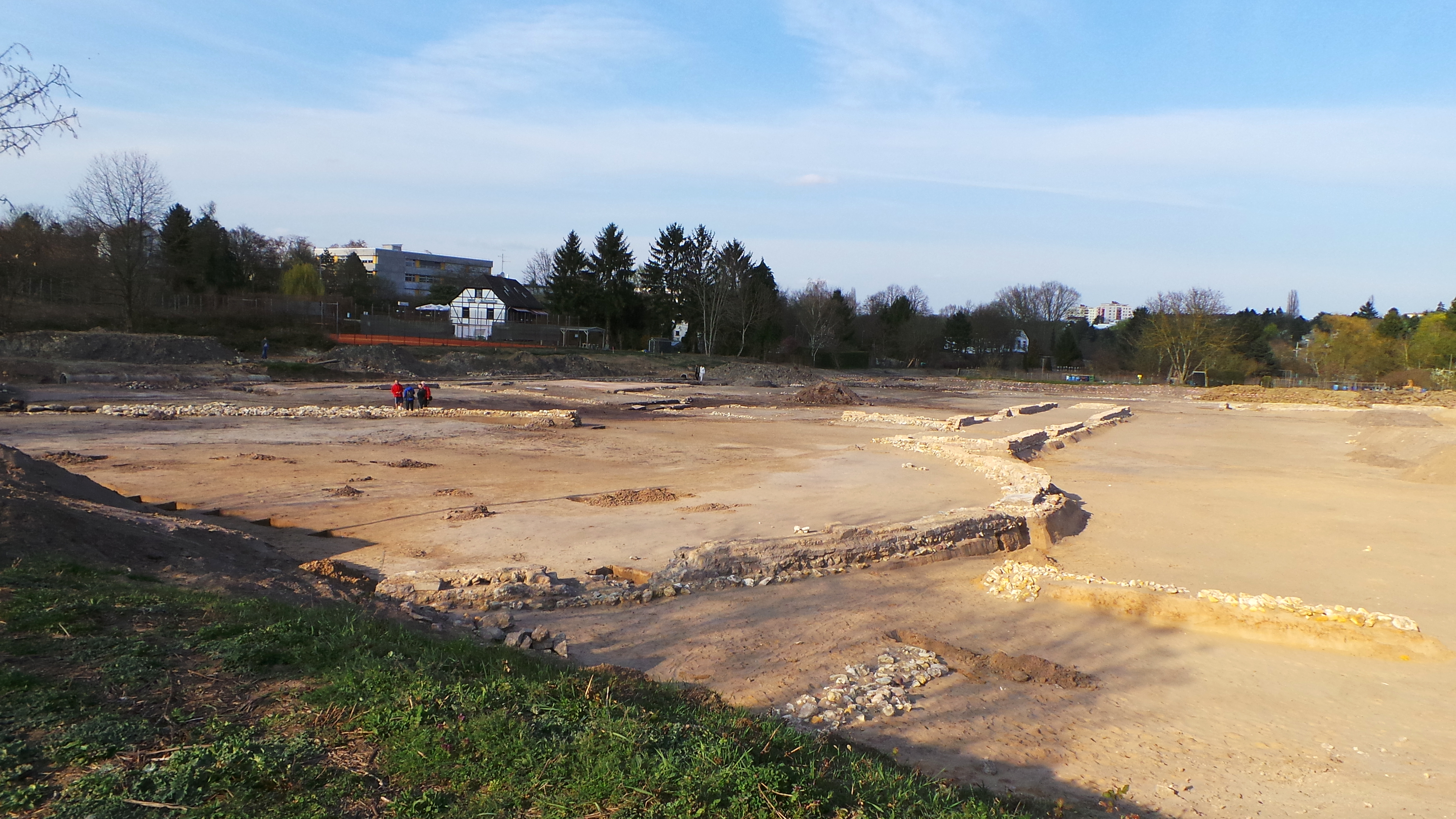 Freigelegte Überreste eines römischen Gestüts im Gonsbachtal bei Mainz-Gonsenheim.